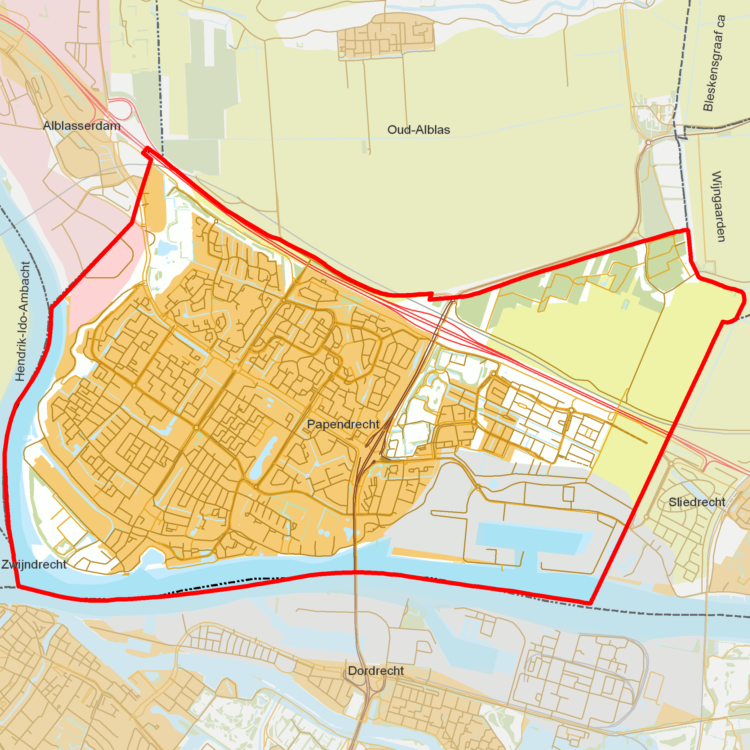 BAG woonplaatsen - Gemeente Papendrecht.png